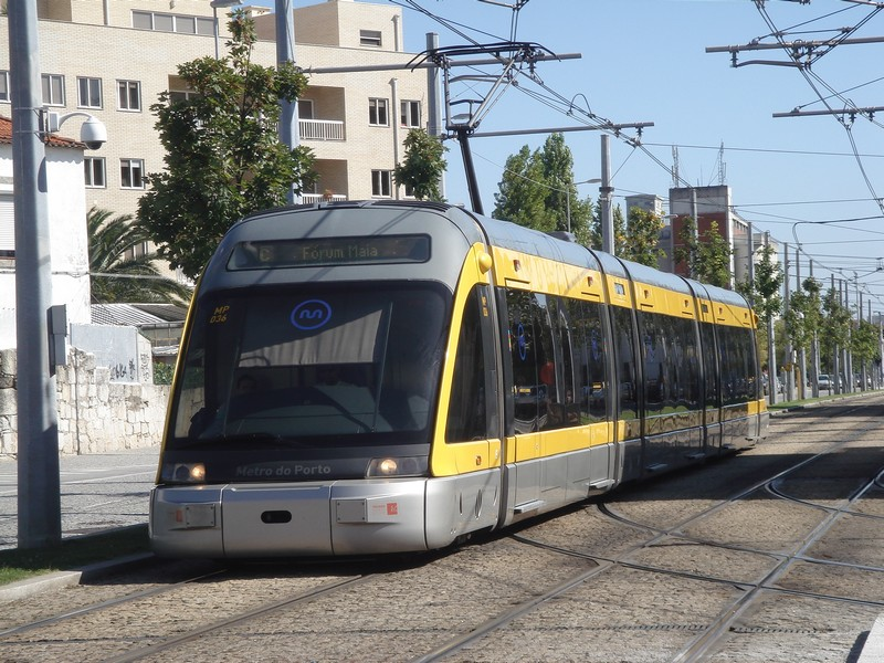 MP 036 com destino à Povoa de Varzim